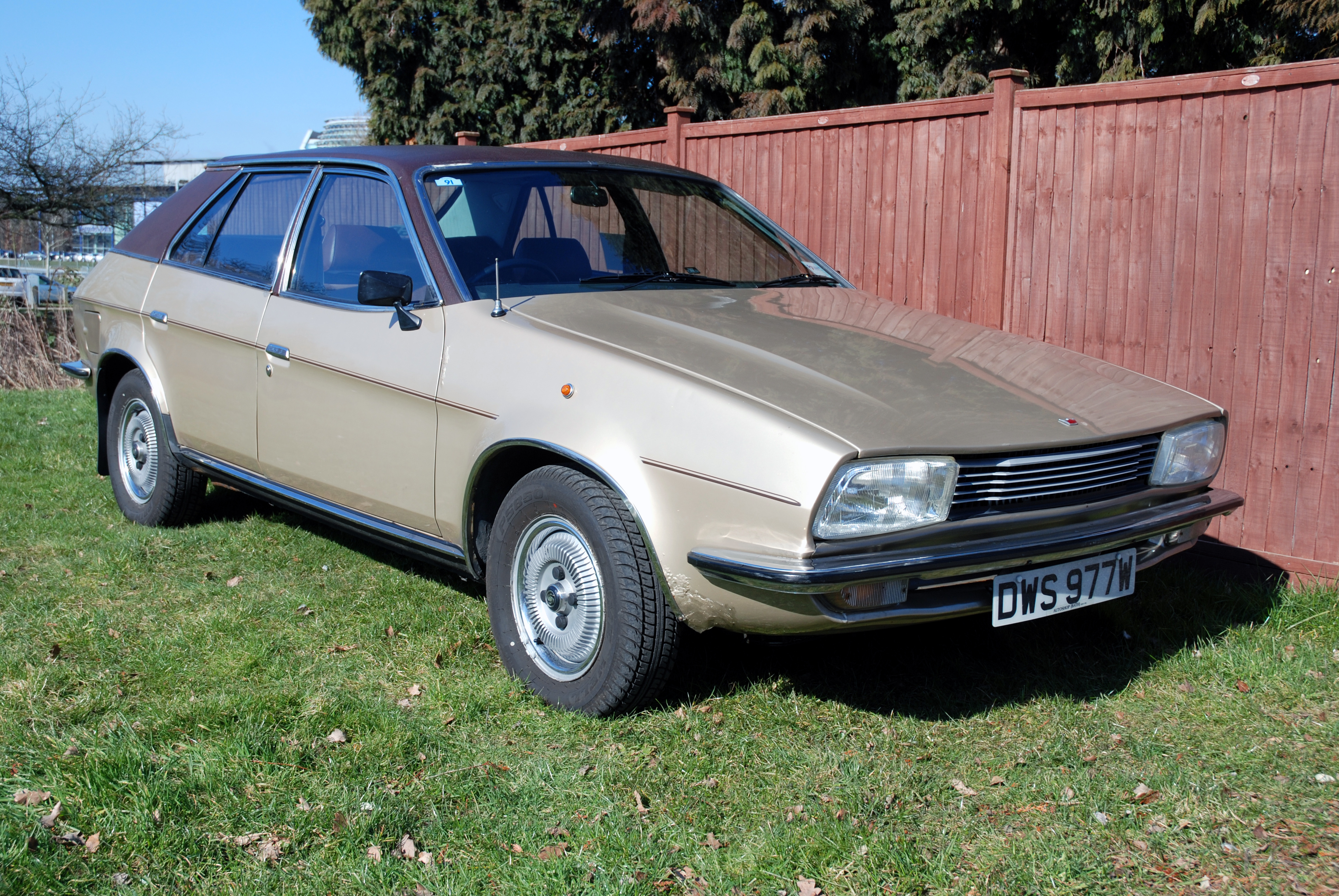 Brooklands,Mar 2010